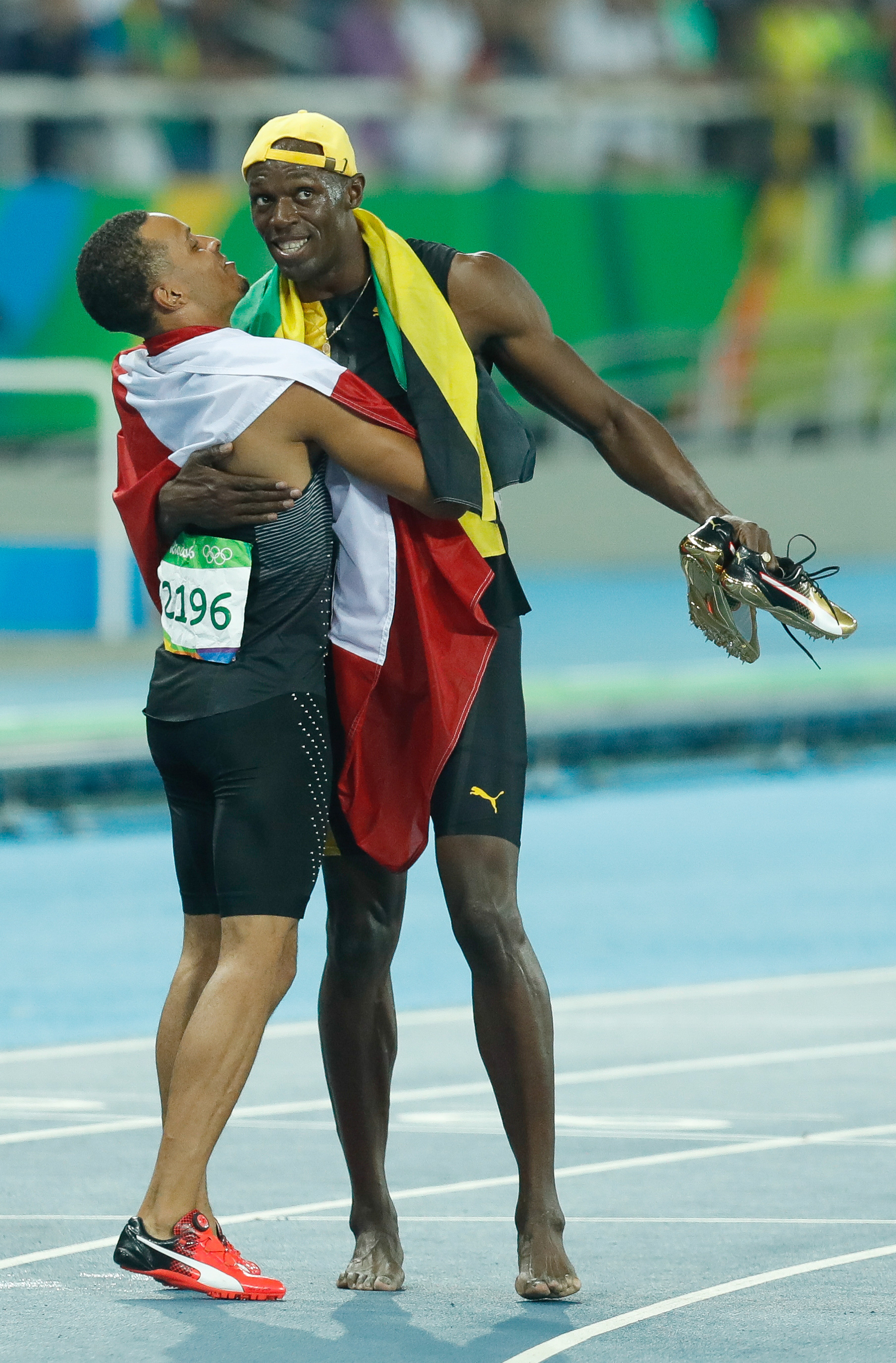 Rio de Janeiro - O jamaicano Usain Bolt, garantiu o ouro e fez história ao conquistar pela terceira vez o título de homem mais rápido do mundo nos 100 metros rasos em uma Olimpíada.